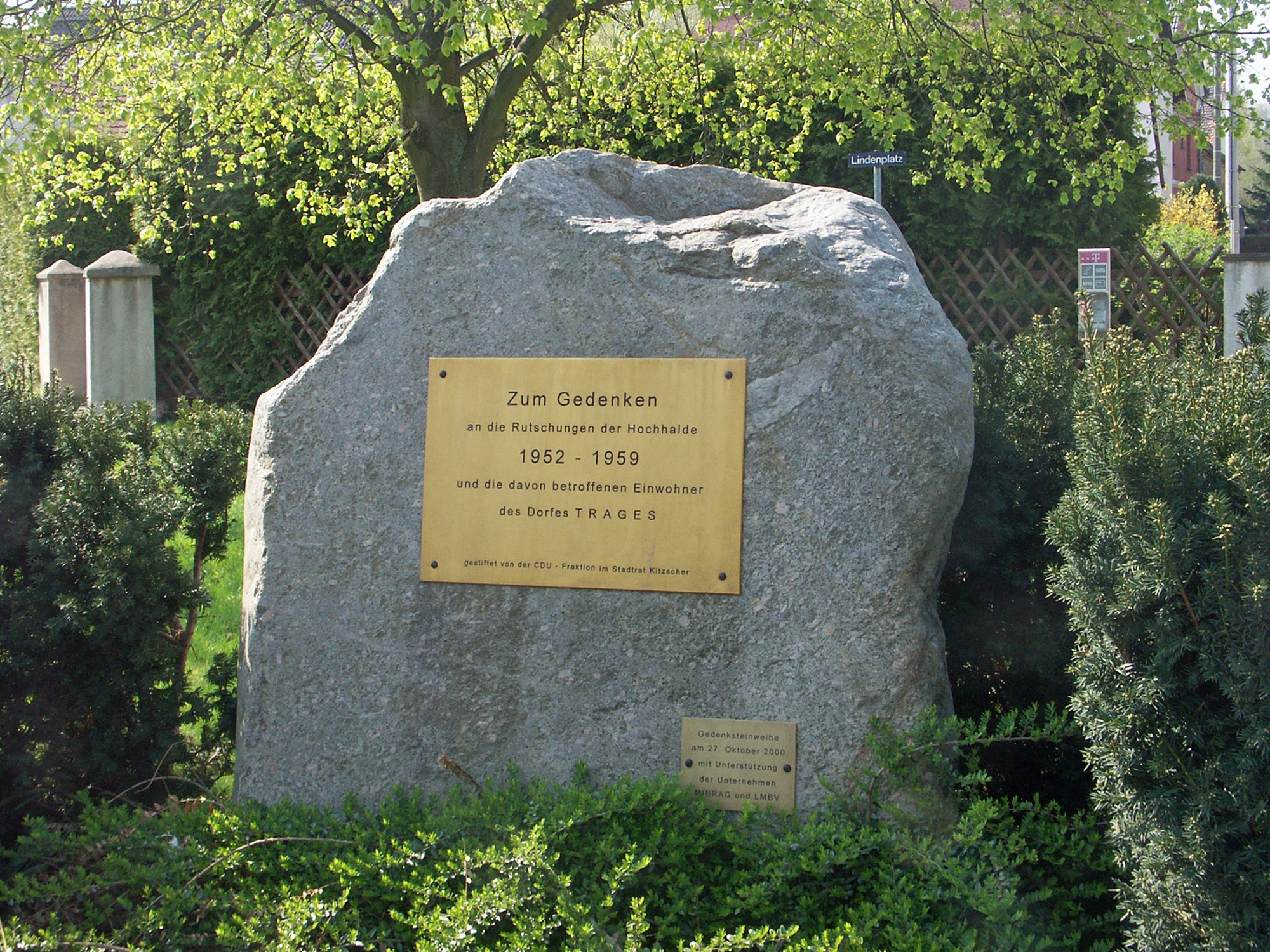 Gedenkstein an die Haldenrutschungen in Trages.